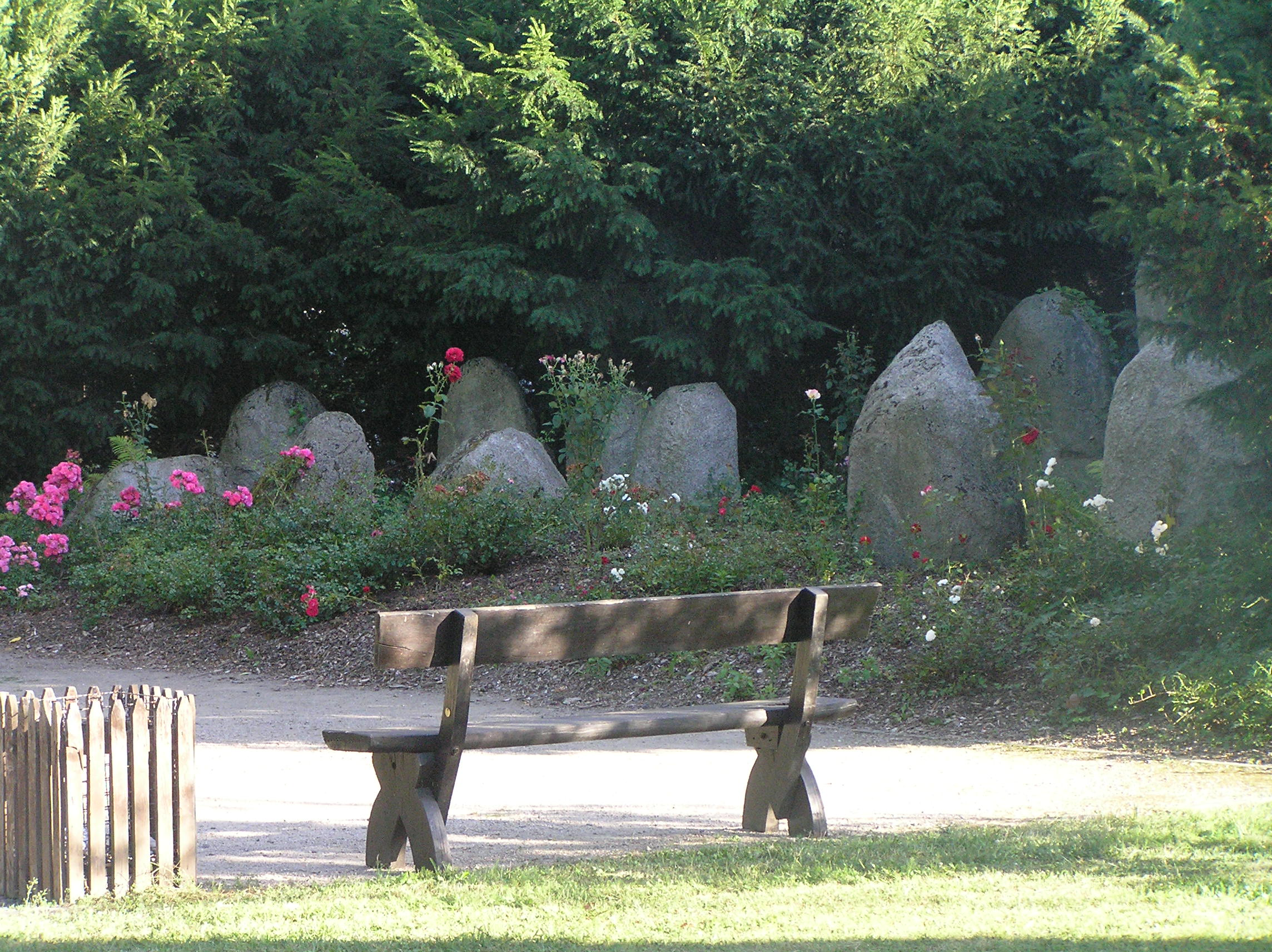 "Gagernsteine" in Hornau, Kelkheim. Die Gagernsteine erinnern an die Familie von Gagern, die in Hornau 1818 bis 1866 lebte. Erinnert wird an Hans Christoph Freiherr von Gagern, seine Frau Charlotte und ihre zehn Kinder, von denen Friedrich, Heinrich und Maximilian als Vorkämpfer für den Liberalismus bekannt wurden.